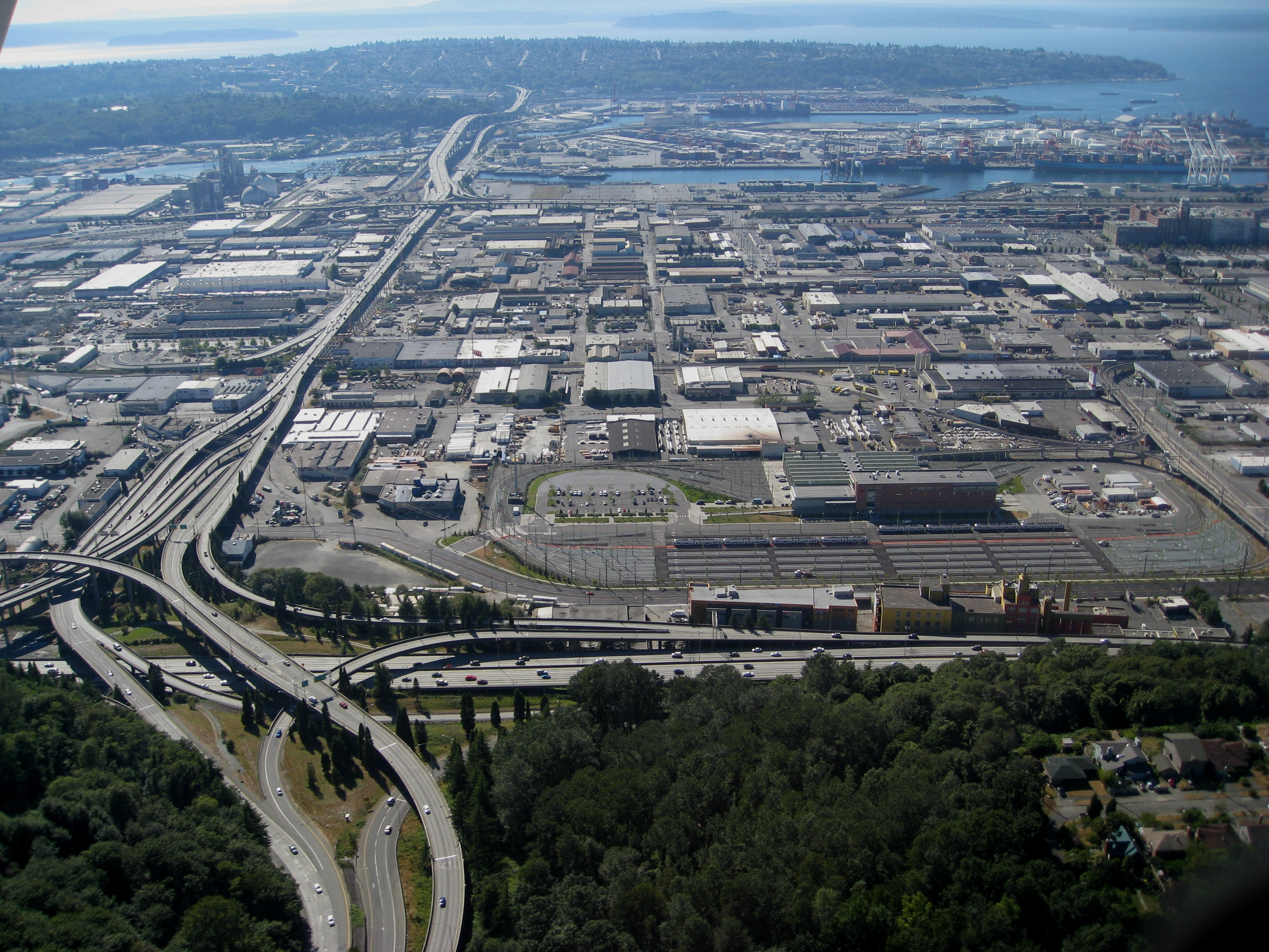 sea0815 047